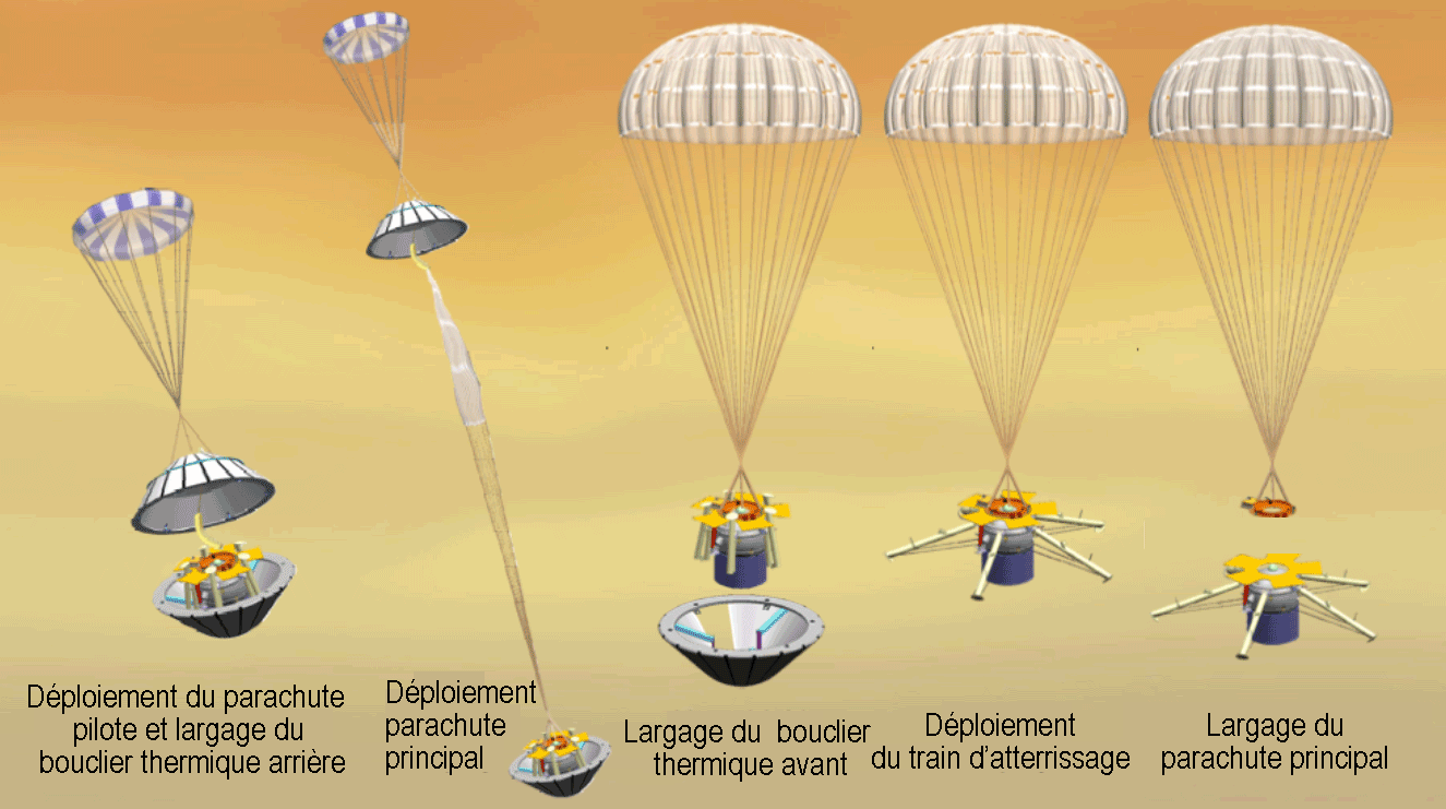 Séquence de descente de la sonde spatiale SAGE vers le sol de la planète Vénus